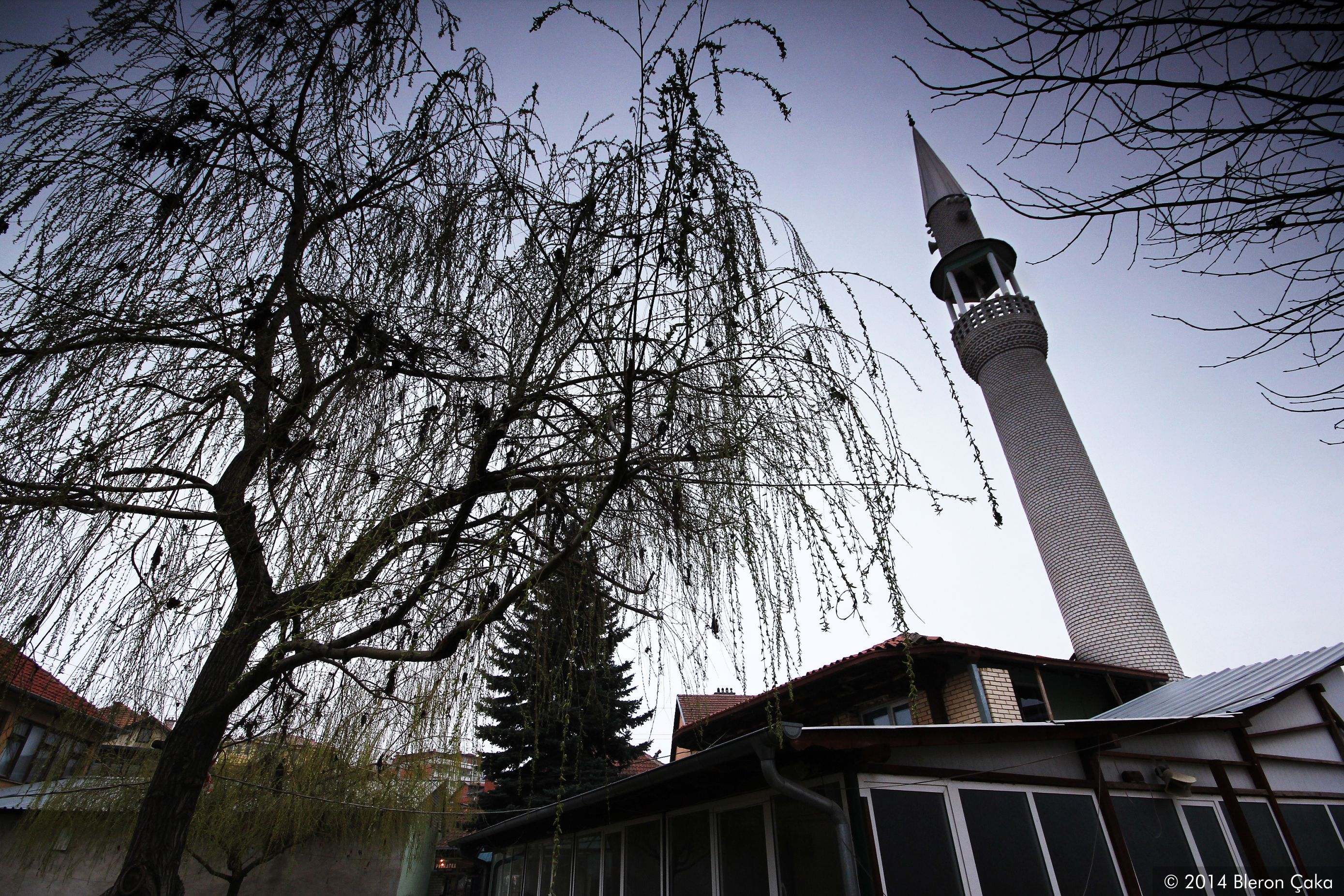 Xhamia e Gazi Ali Beut (1444)